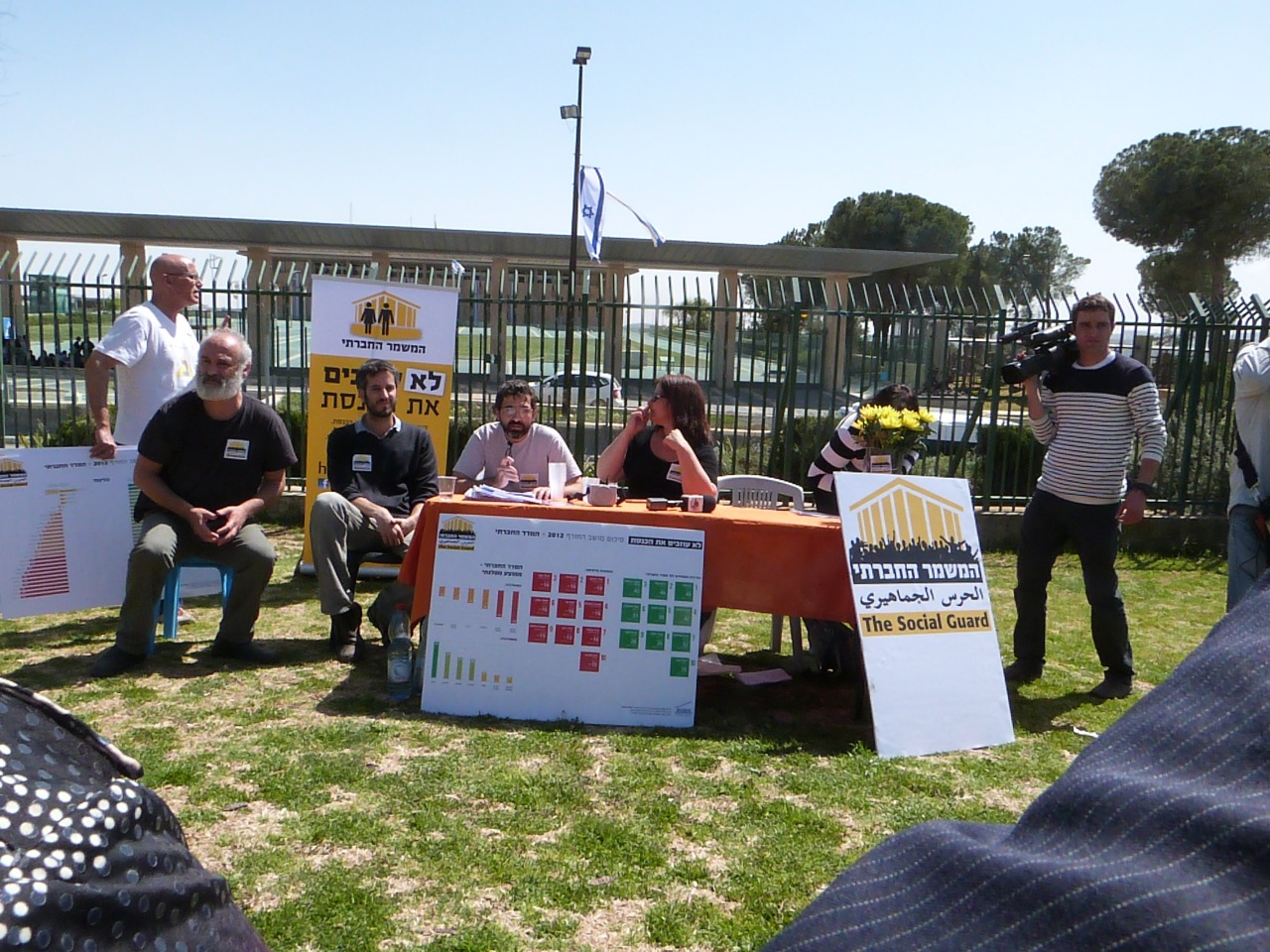 טקס הענקת המדד החברתי הראשון